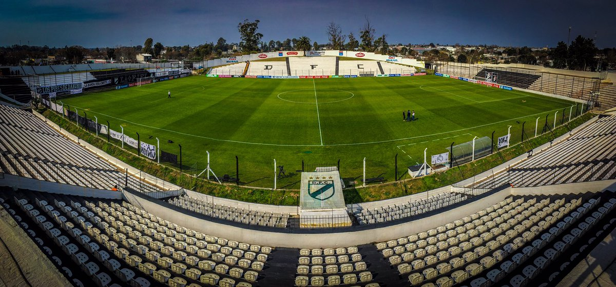 Estadio Jardines del Hipódromo en Marzo de 2019